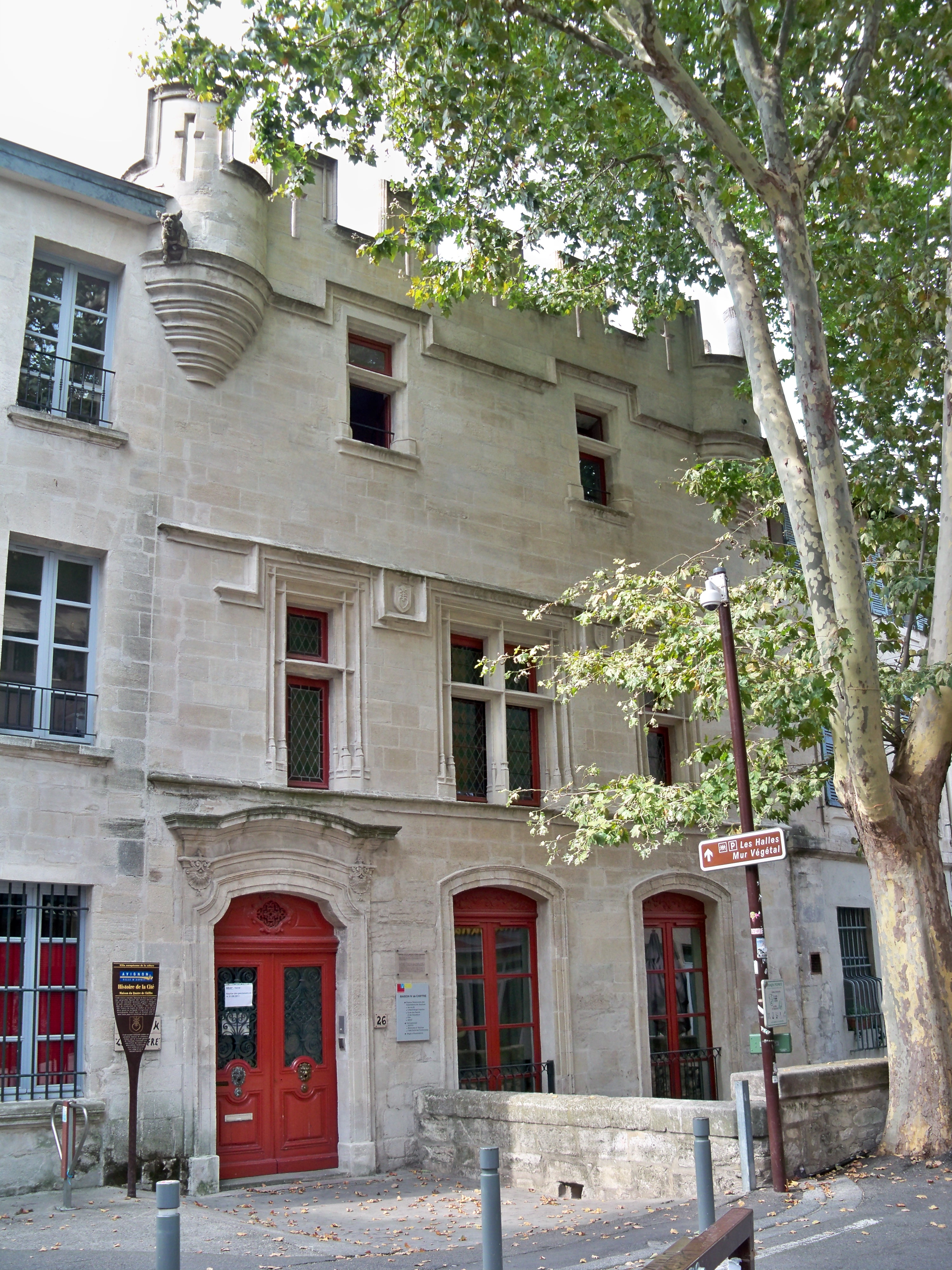 Maison du IV de Chiffre, rue des Teinturiers à Avignon, Vaucluse